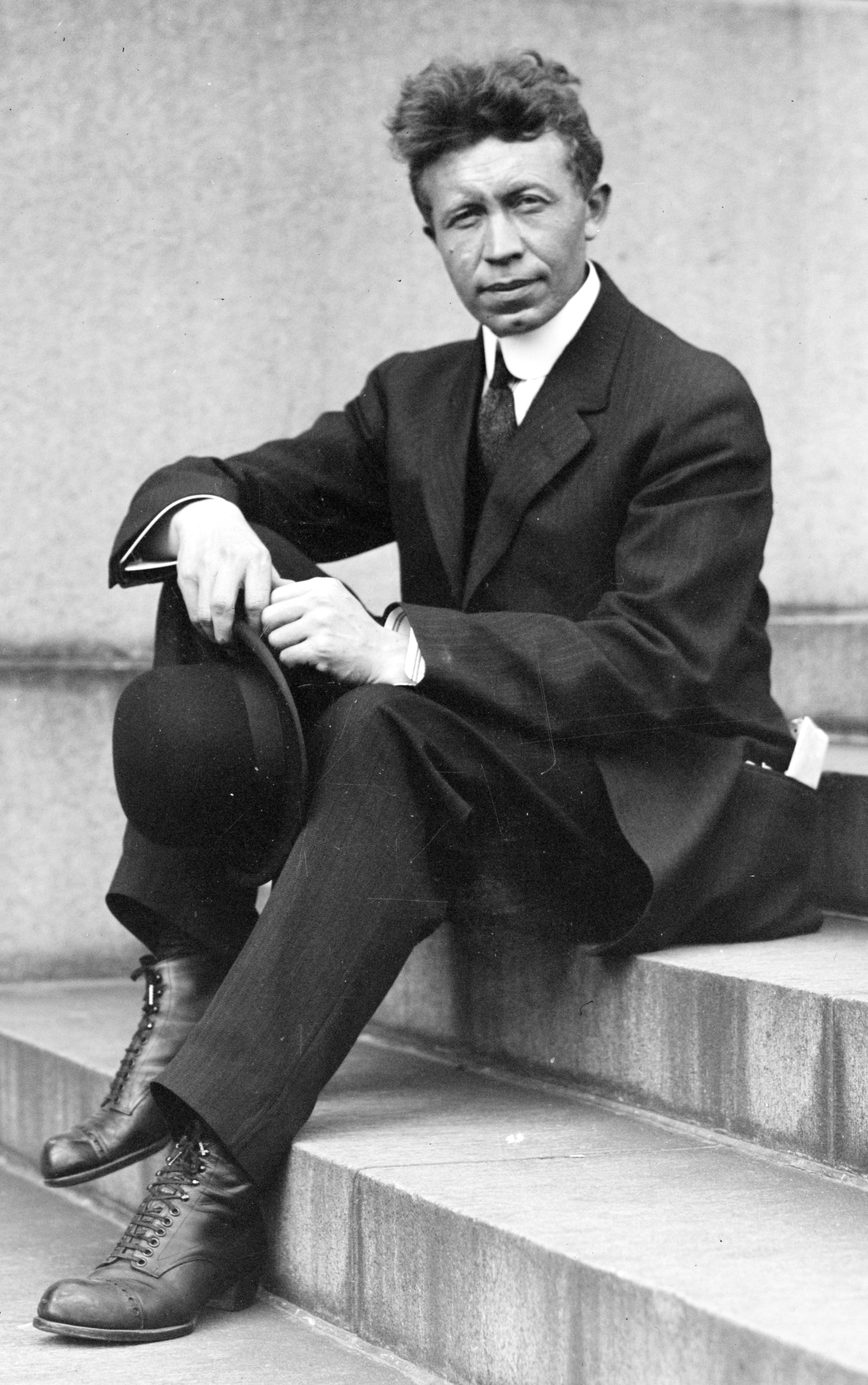 Canadian explorer Vilhjalmur Stefansson (1879–1962)